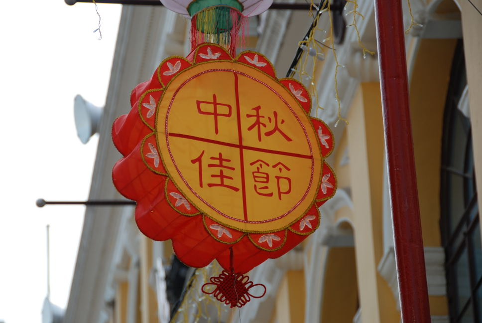 25 Largo do Senado, Macau